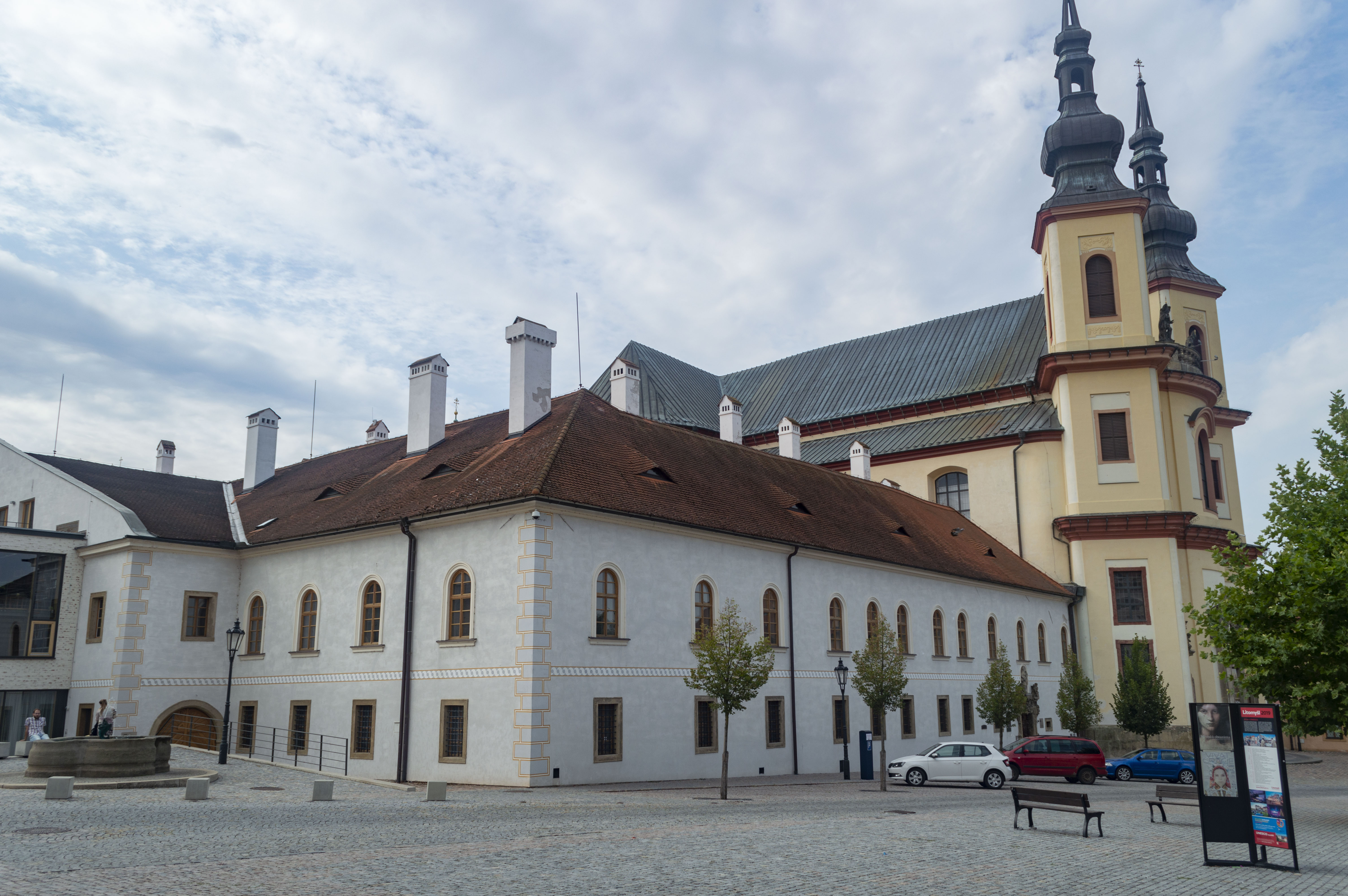 Piaristická kolej a kostel Nalezení sv. Kříže (Litomyšl)